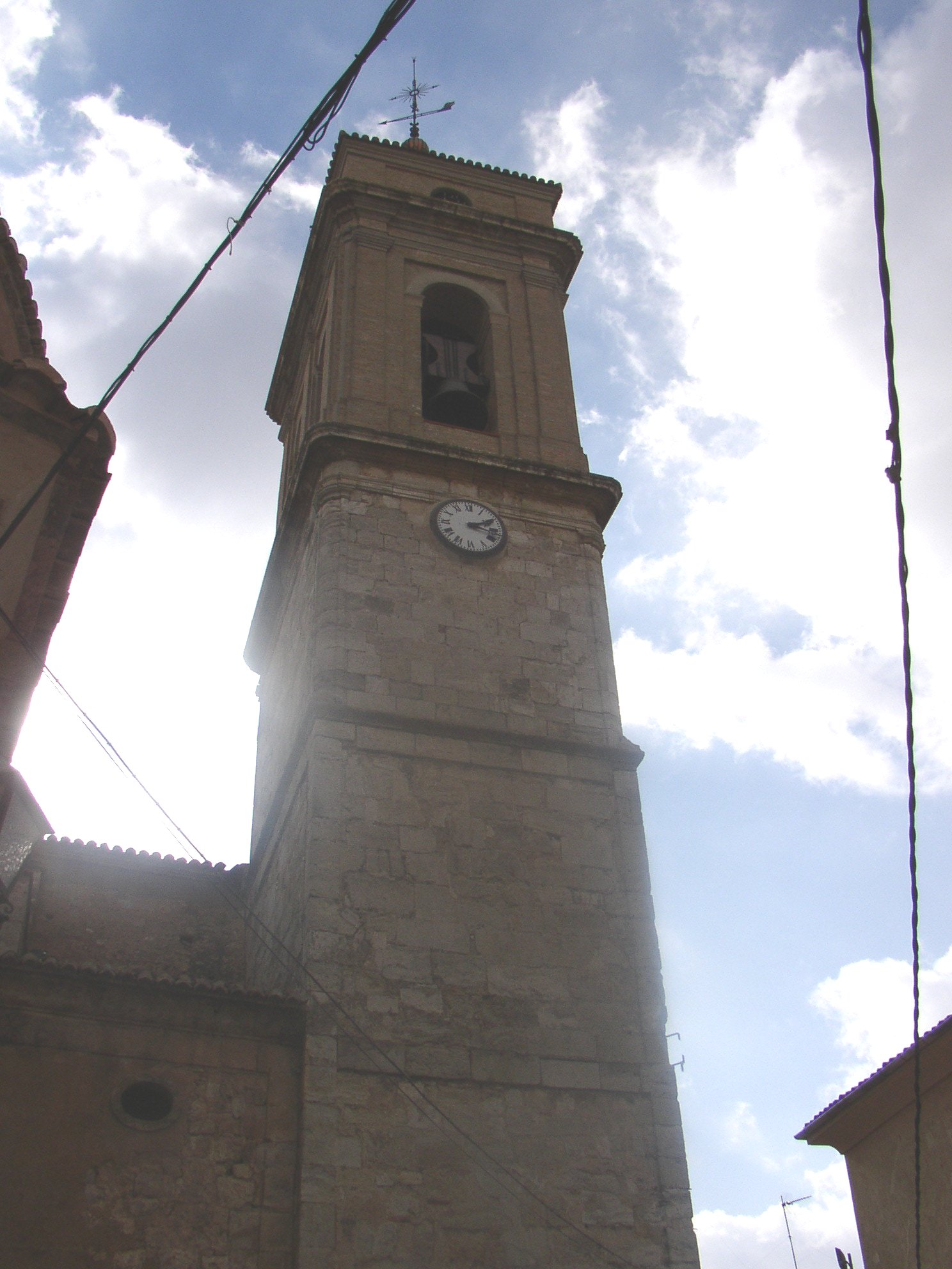 Requena és un municipi valencià a la comarca de la Plana d'Utiel. Torre de l'Esglèssia de Salvador.